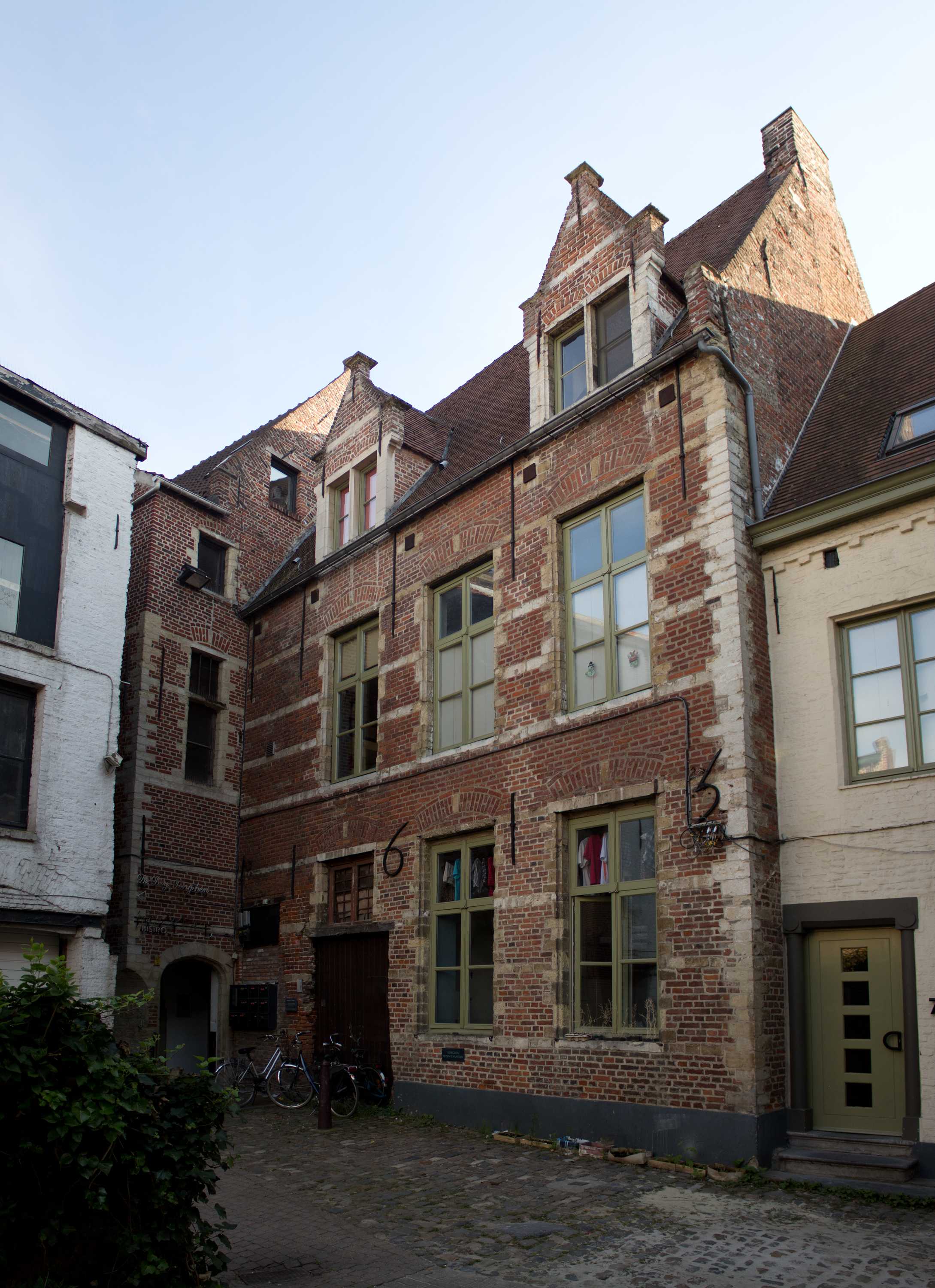 Busleidengang en Collegium Trilingue, Leuven.